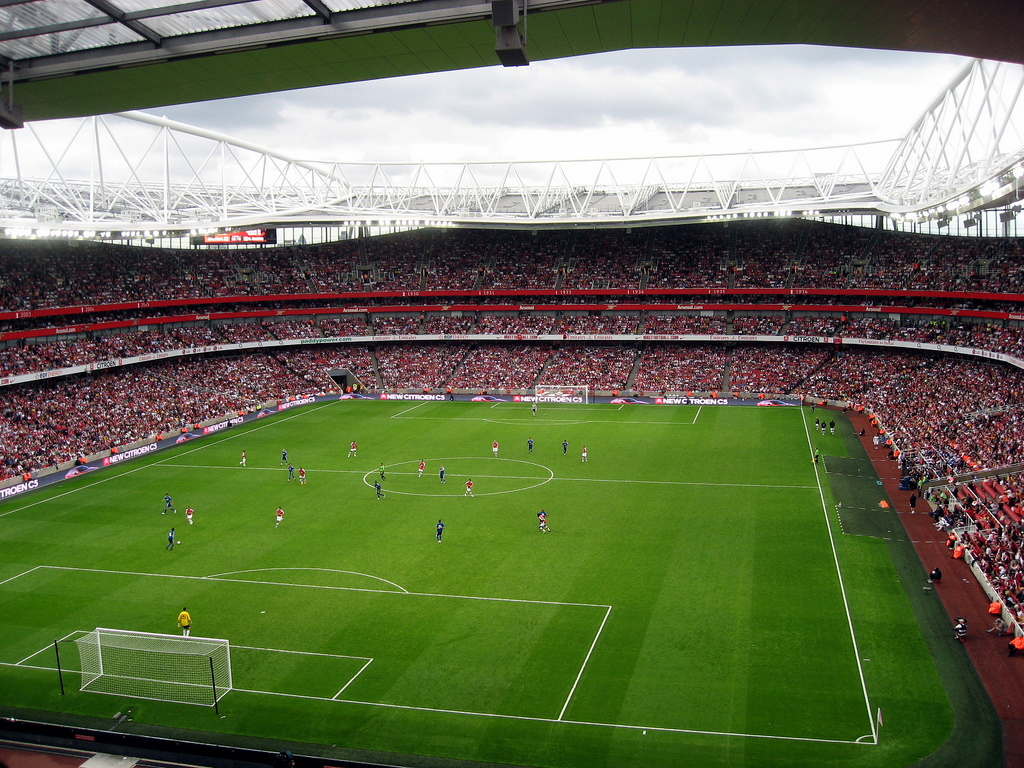 Arsenal vs Real Madrid: a bigger view.